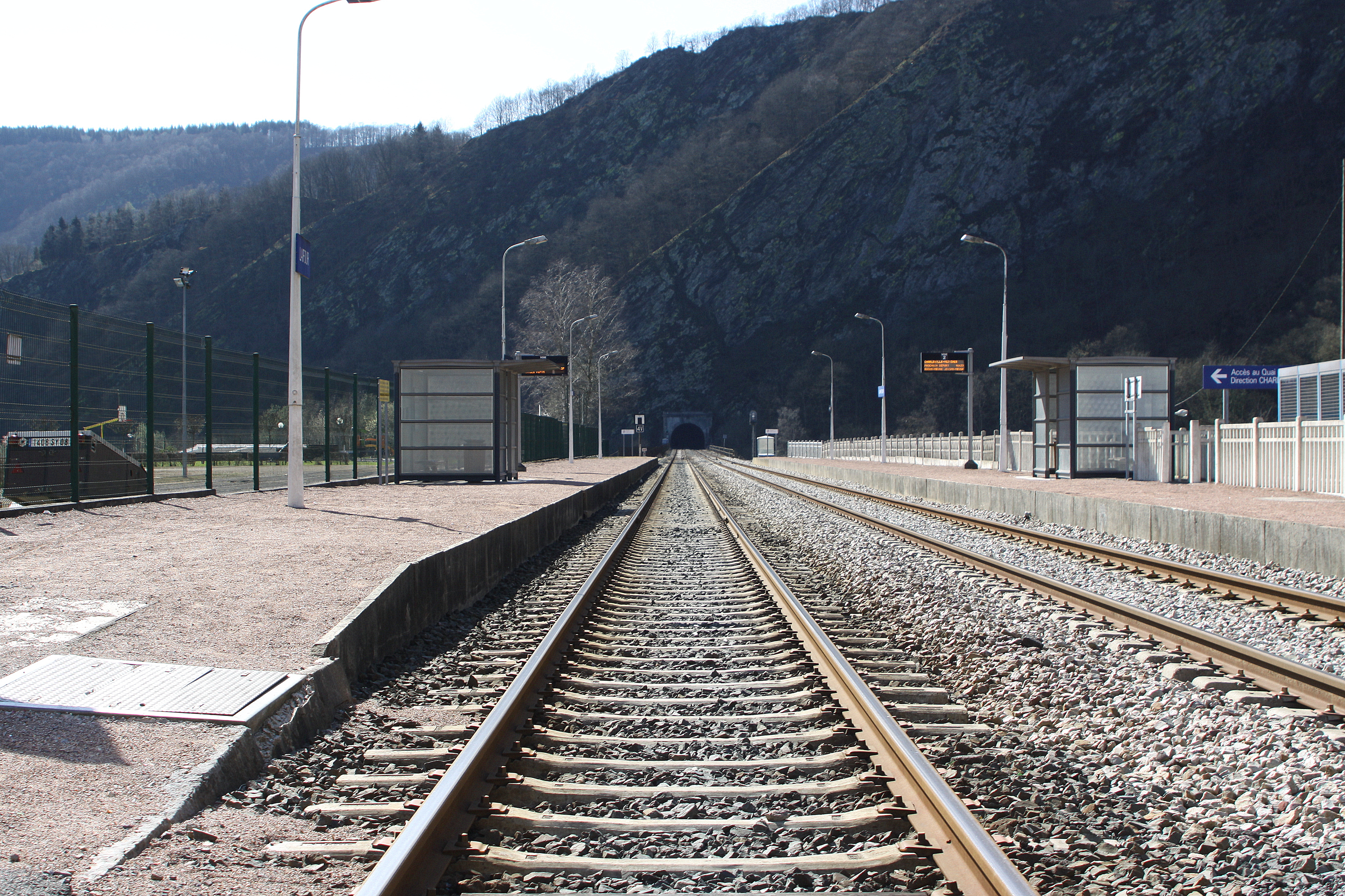 Halt vu Laifour gesinn an Direktioun Bréck an Tunnel